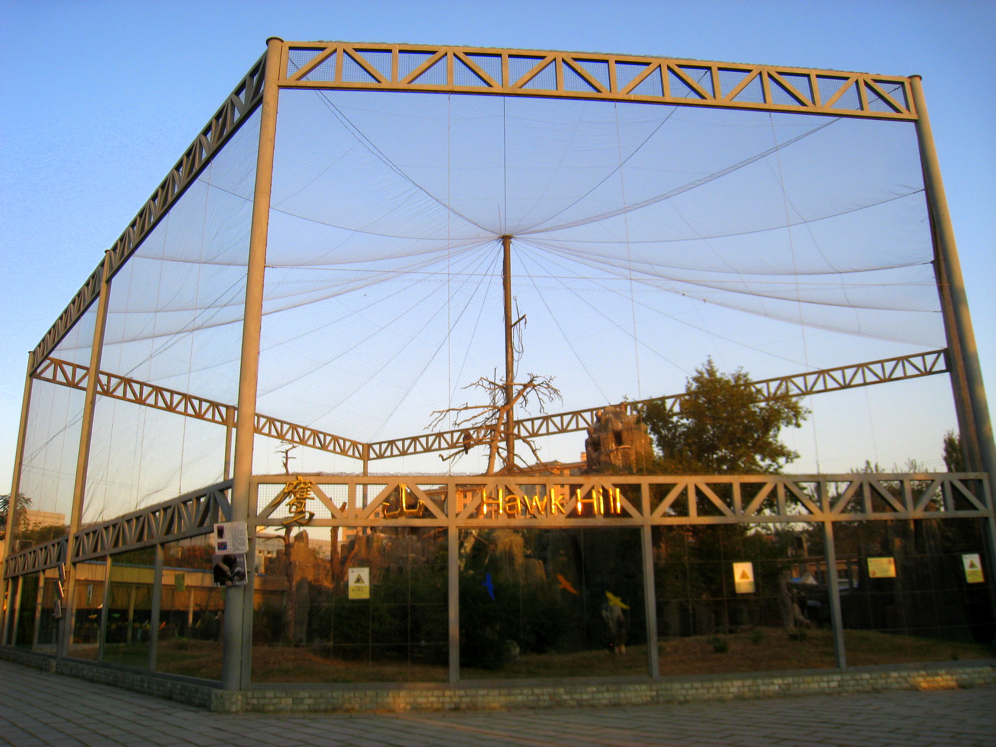 Beijing Zoo (北京动物园), Beijing, China.